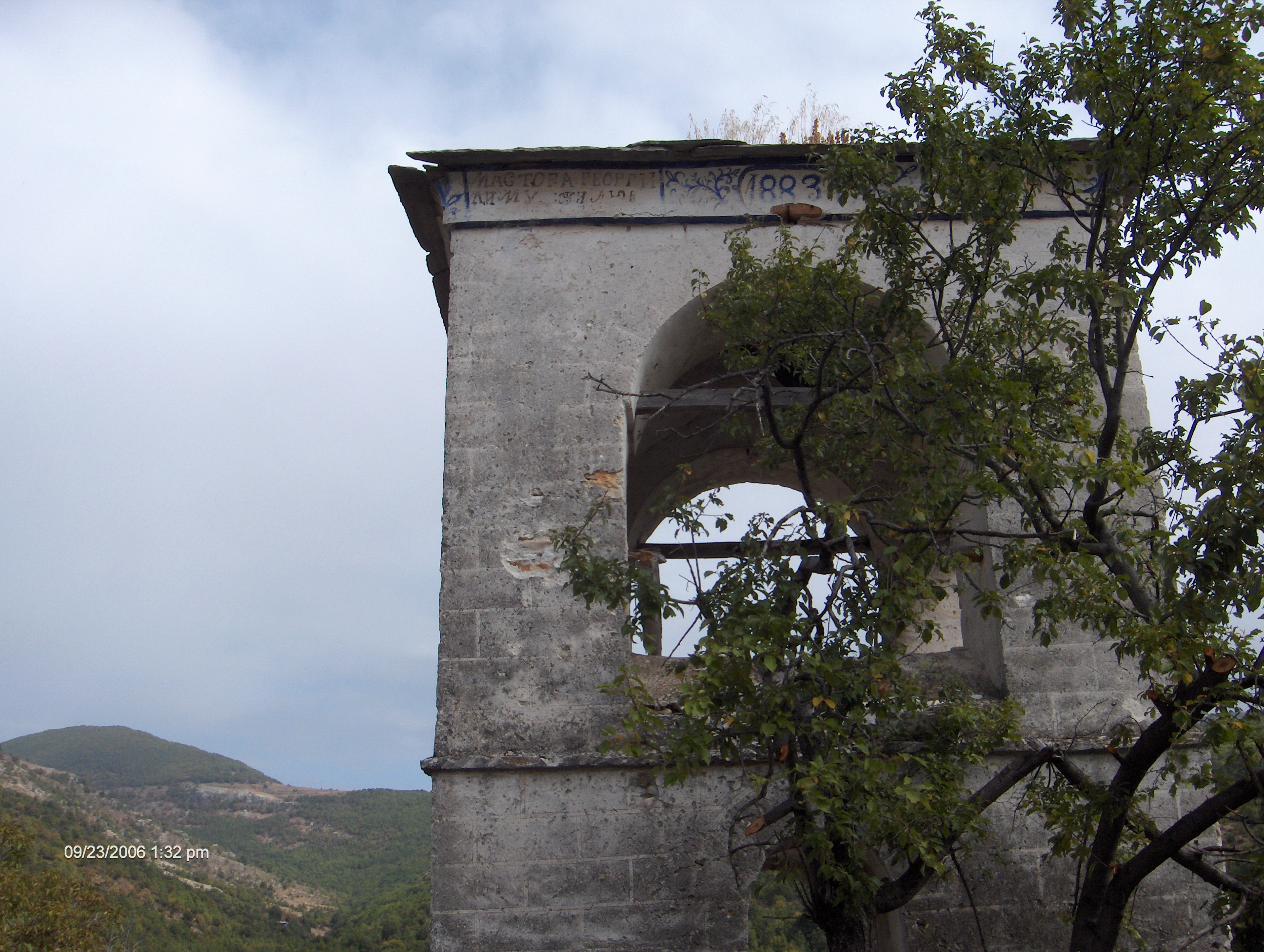 Steeple at Banitsa (ruins)